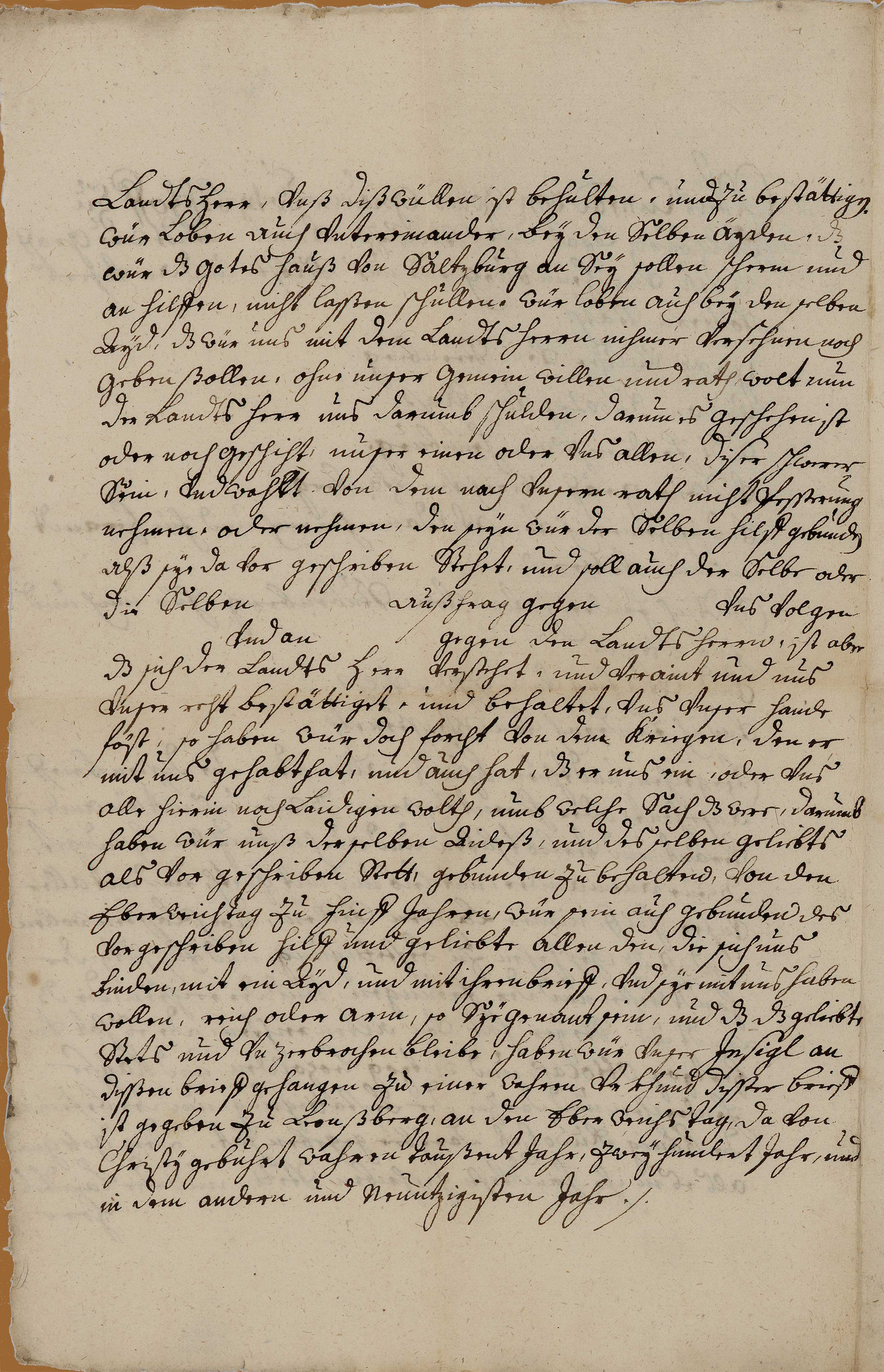 Abschrift der Urkunde des Landsberger Bundes aus dem Jahr 1292, Seite 2